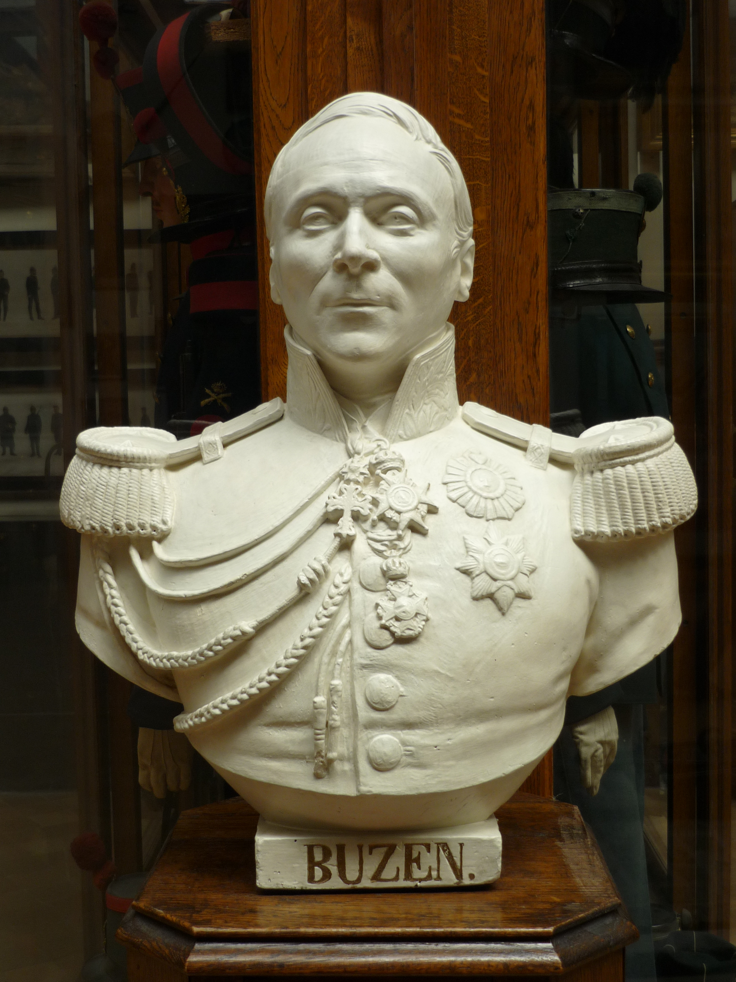 Buste de Gérard Buzen, Musée du Cinquantenaire, Bruxelles, Belgique. Royal Museums of Art and History Native nameMusées royaux d’art et d’histoireLocationBrusselsCoordinates50° 50′ 25.85″ N, 4° 23′ 35.37″ E Established1835Web page control : Q945059 VIAF: 147671754 ISNI: 0000 0001 2342 957X GND: 1006854-5 SUDOC: 162391722 institution QS:P195,Q945059